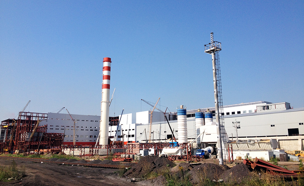 Строительство технологического комплекса обжиговой машины №3 на ОАО "Михайловский ГОК"